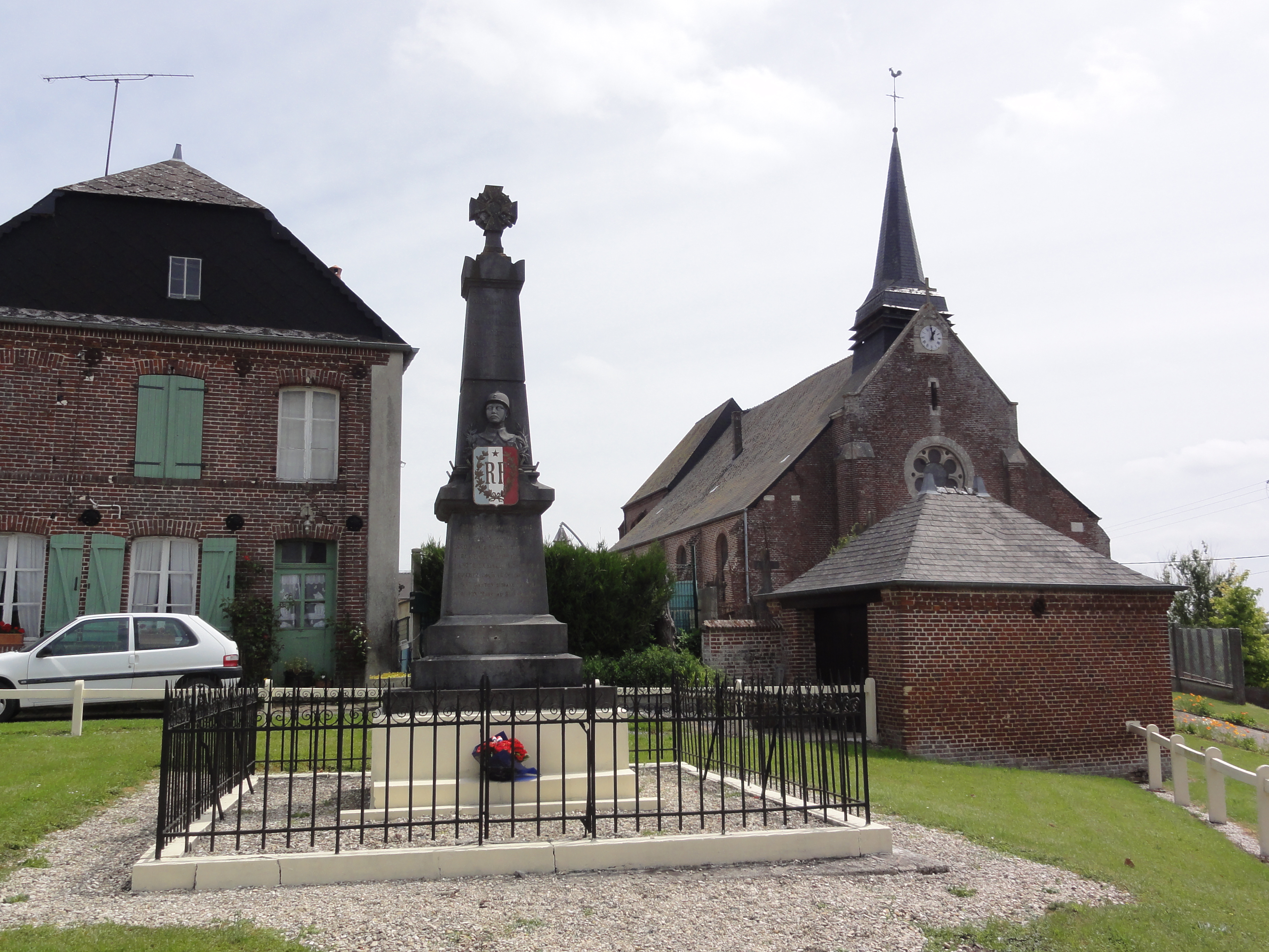 Chéry-lès-Rozoy (Aisne) monument aux morts et église